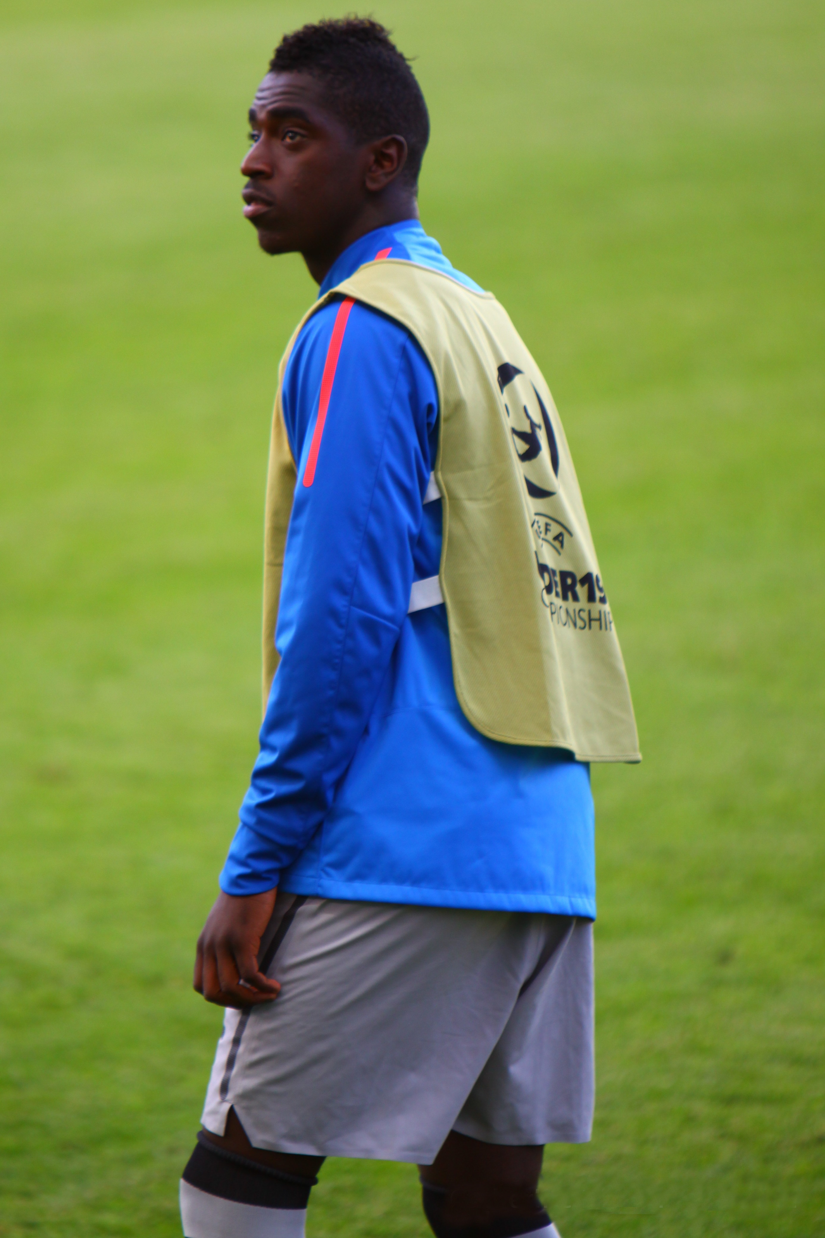 U-19 Portugal vs Spain.